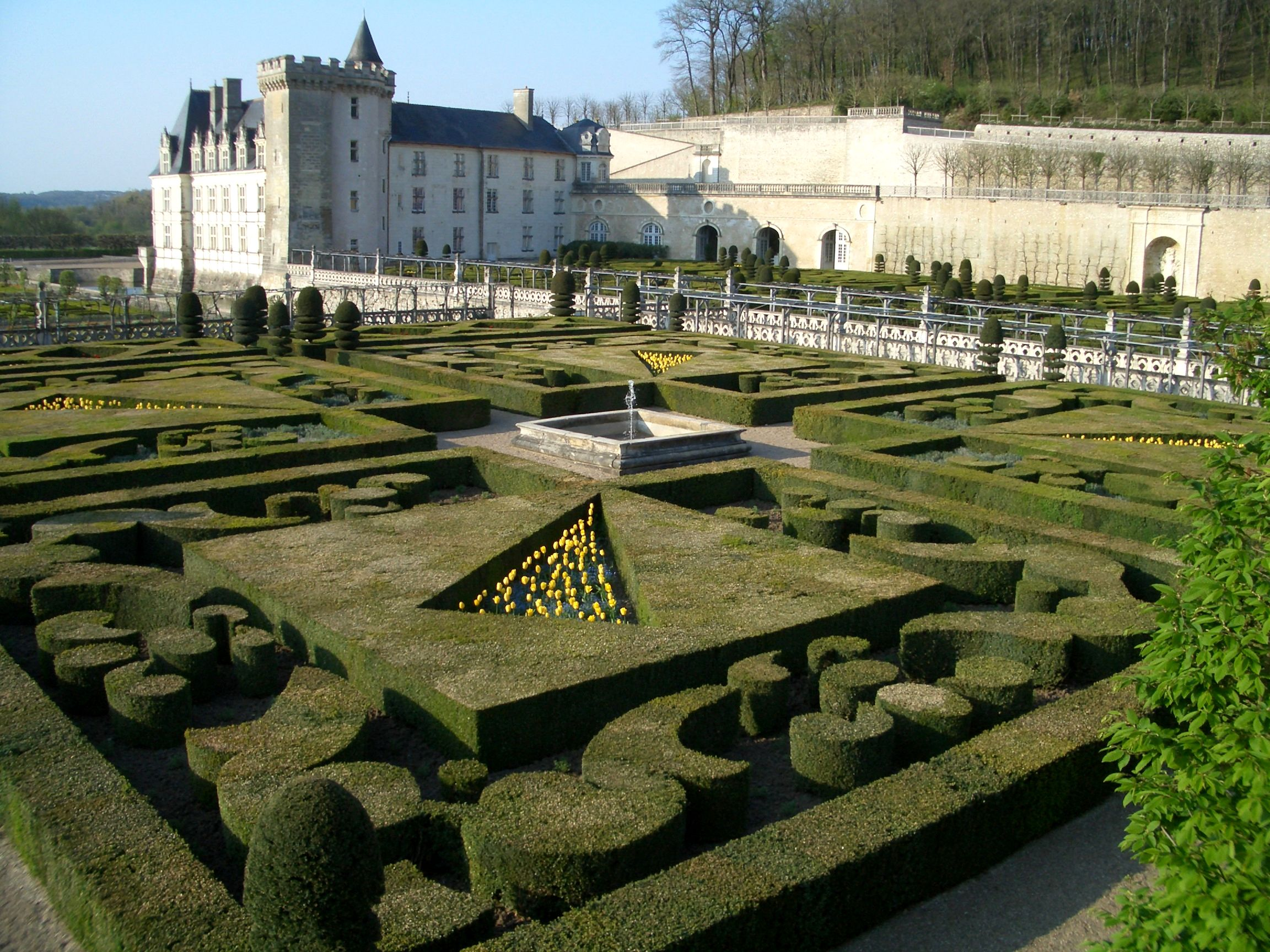 Avant plan du jardin This building is en partie classé, en partie inscrit au titre des Monuments Historiques. .